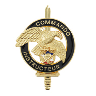 Insigne d'instructeur commando